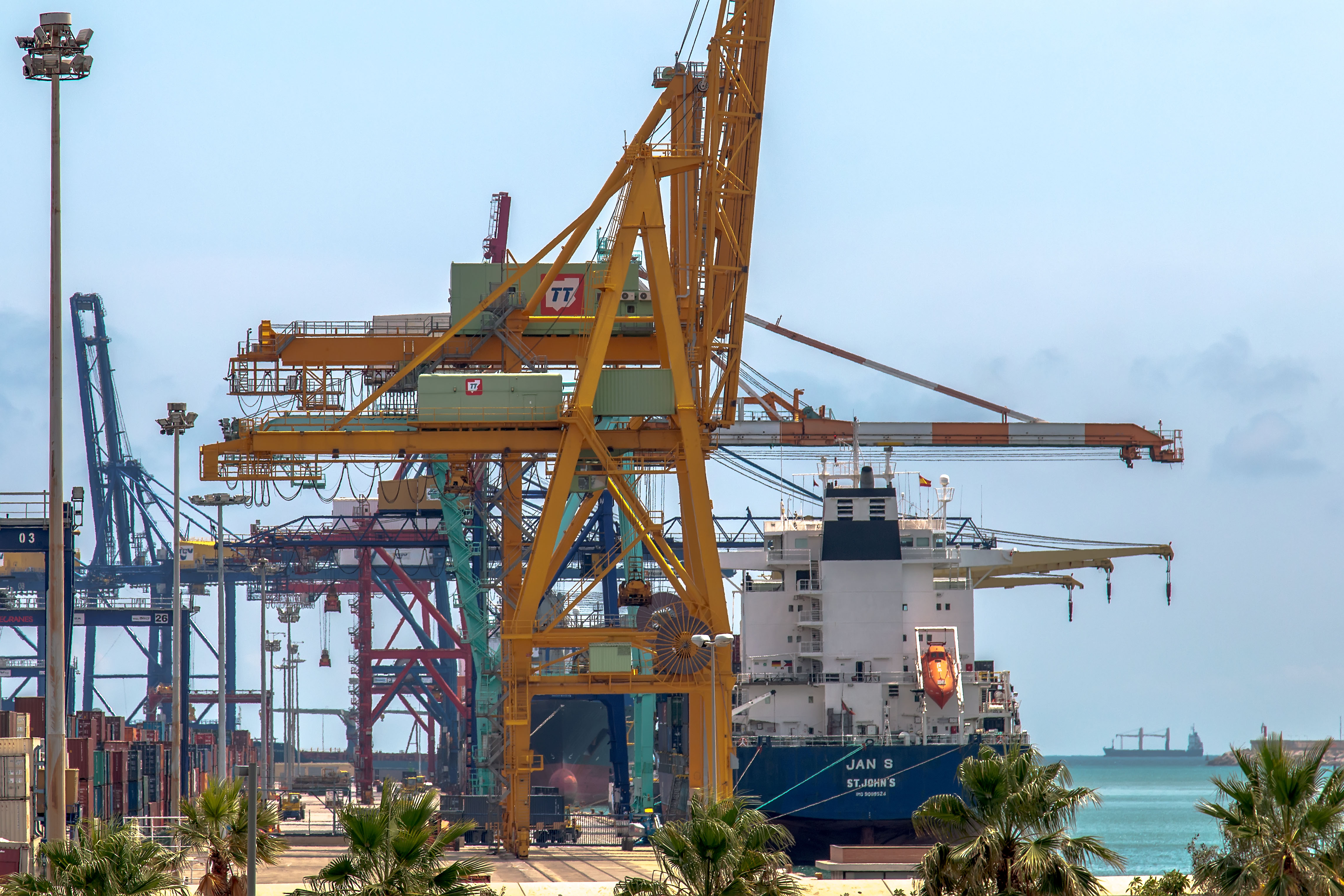 Контейнеровоз "Jan S" в порту Валенсии.